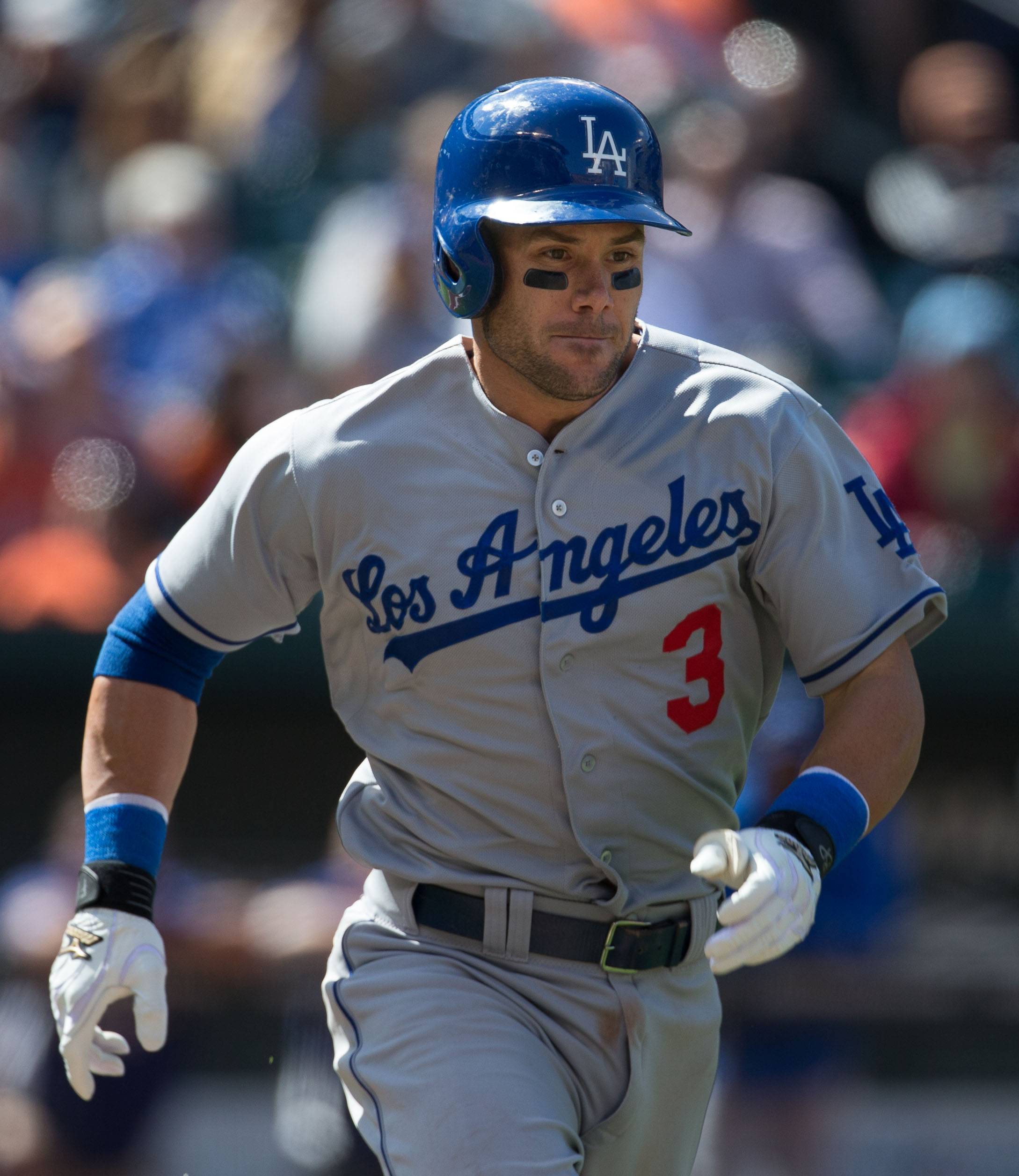 Skip Schumaker